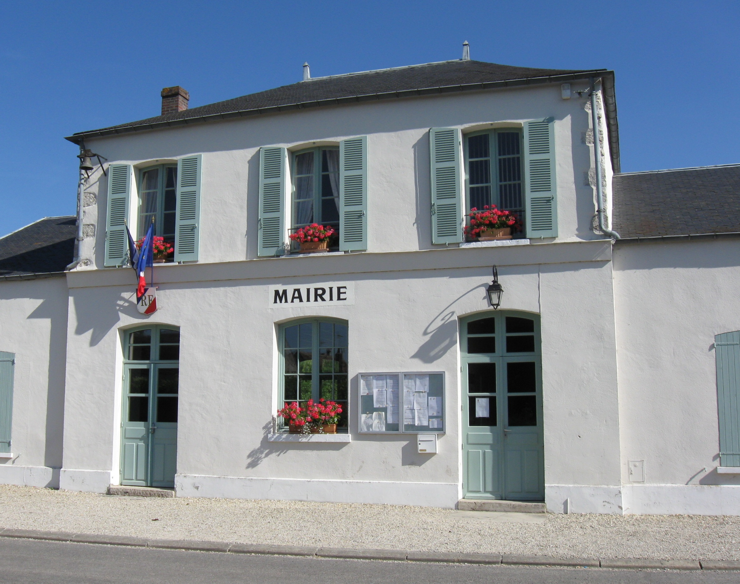 Mairie de Saint-Sauveur-lès-Bray. (Seine-et-Marne, région Île-de-France).